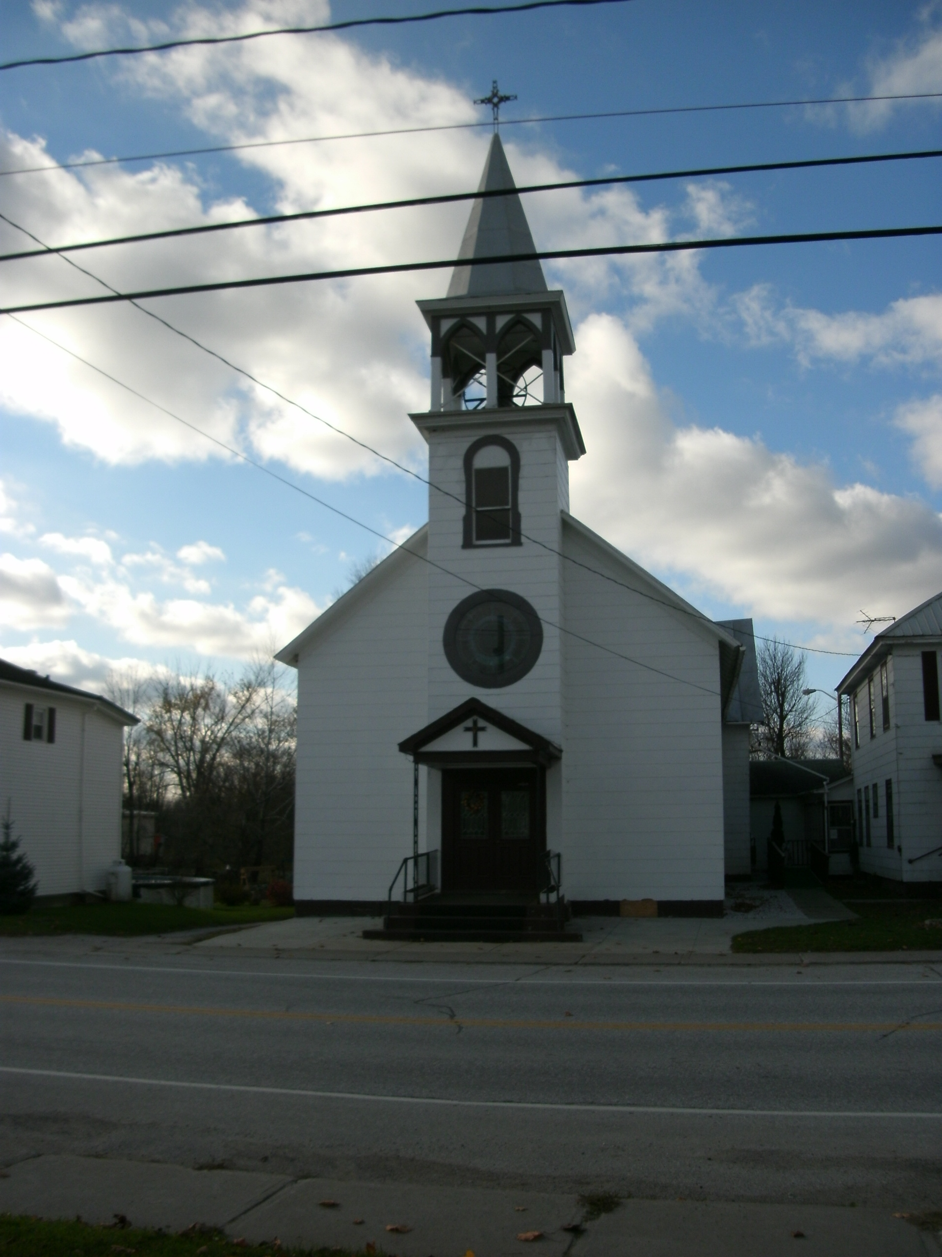 Church in Alburgh, Vermont